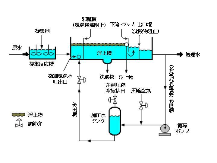 加圧浮上法のフロー例